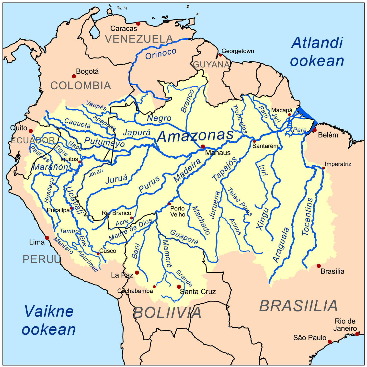 Amazonase jõgikond